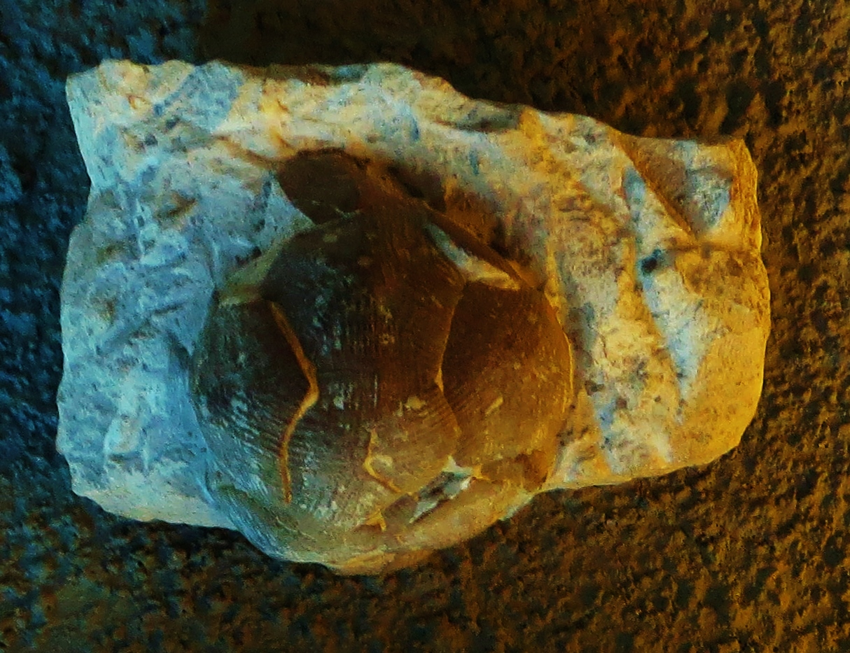 Fossil of Marsupites, an extinct crinoid- Took the picture at Naturalis, Leiden